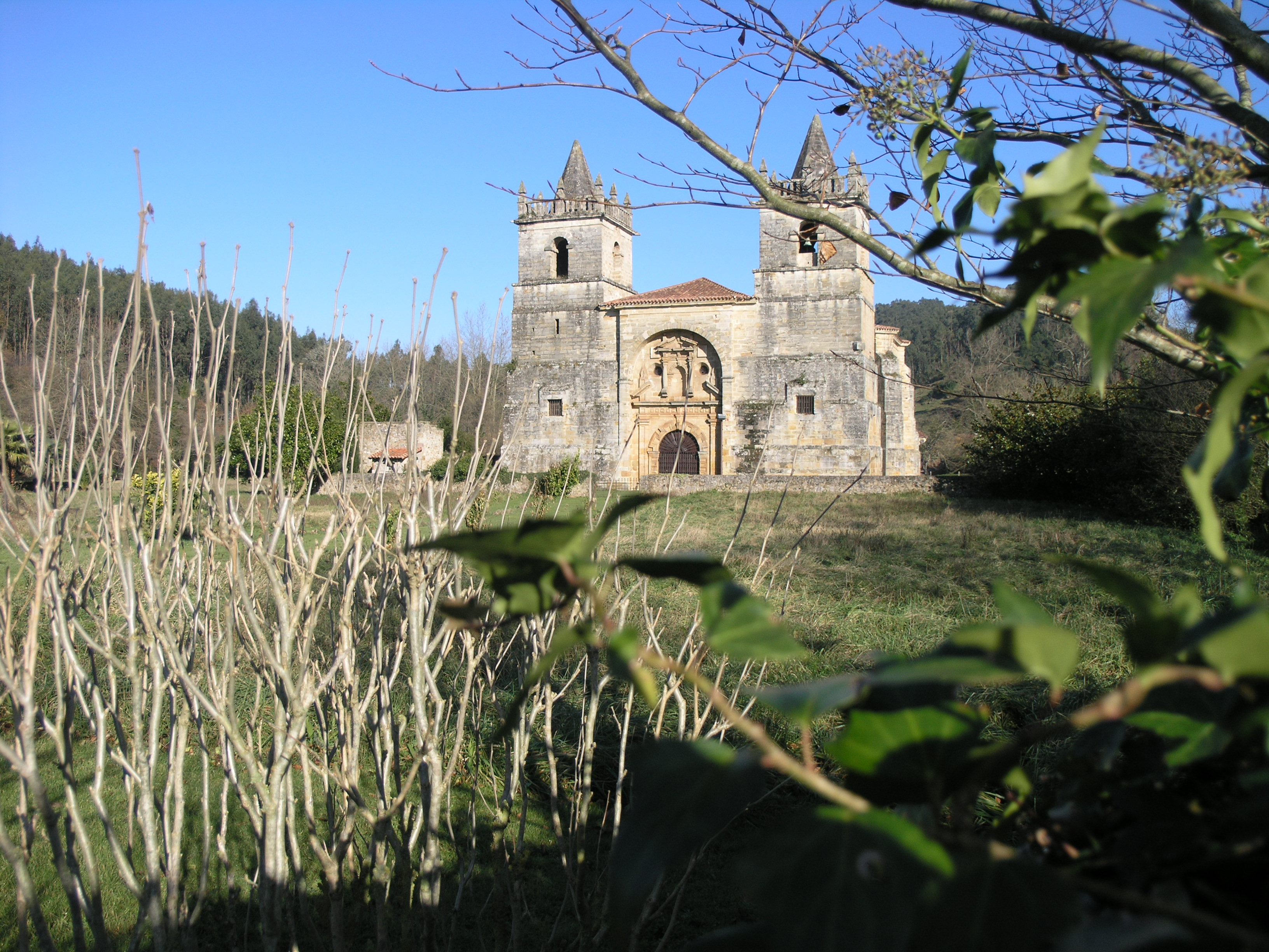 Iglesia de San Martín de Tours, en Cigüenza, Alfoz de Lloredo, Cantabria, España. Bien de interés cultural desde 1992. Arquitectura barroca con influencia del barroco colonial peruano. Data de mediados del siglo XVIII.